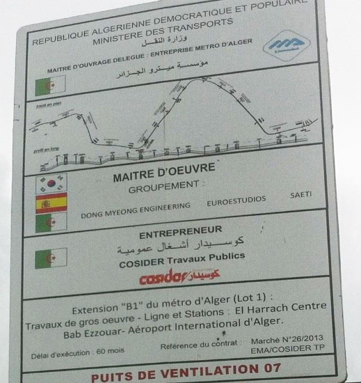 Chantier extension B1 du metro d'Alger